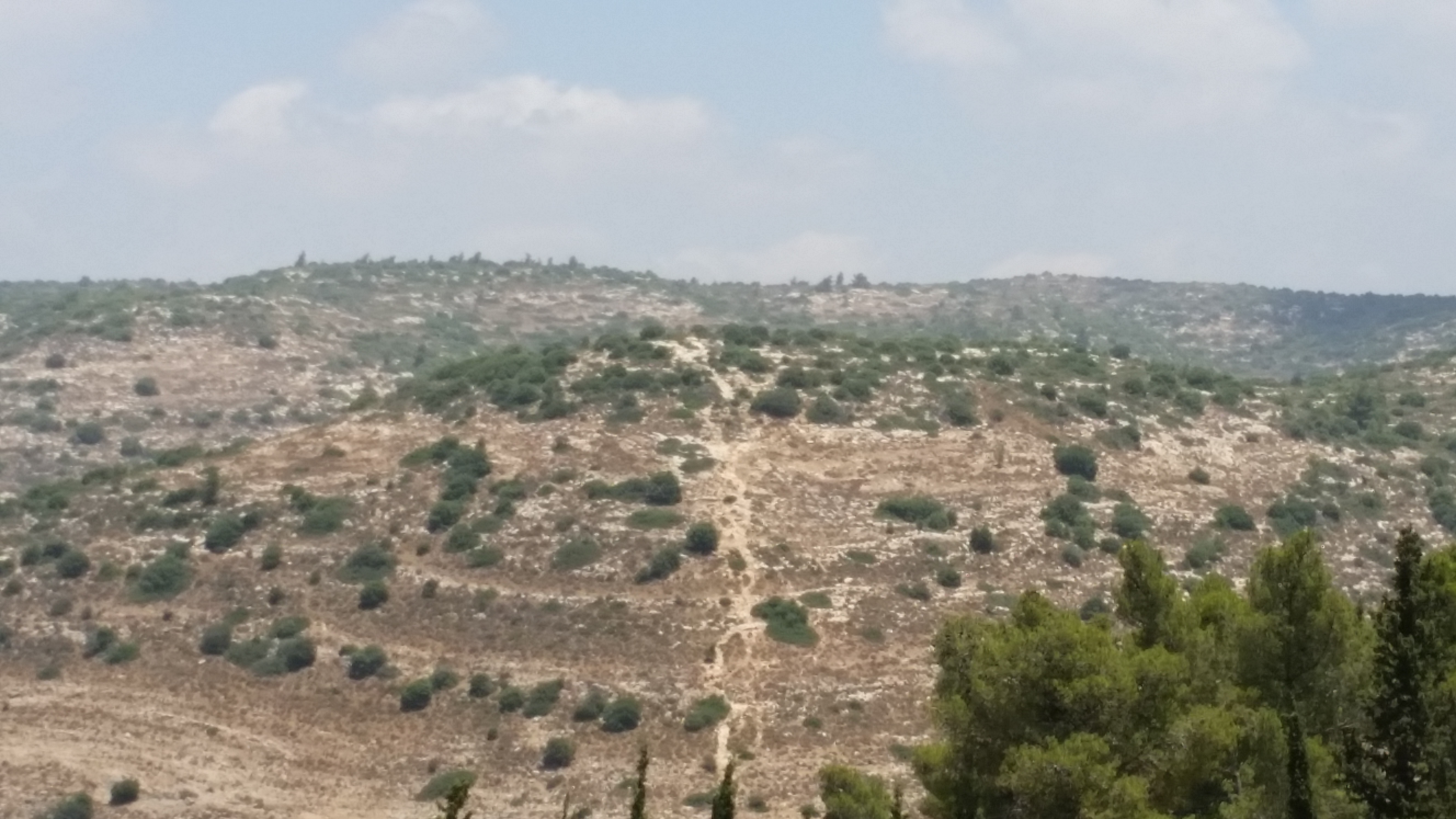 דאהר אל חאג'ה, גבעת הקרב